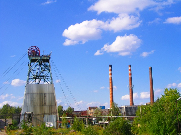 KWK Rydultowy-Anna szyb Leon IV